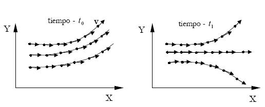 Lineas de corrientes.